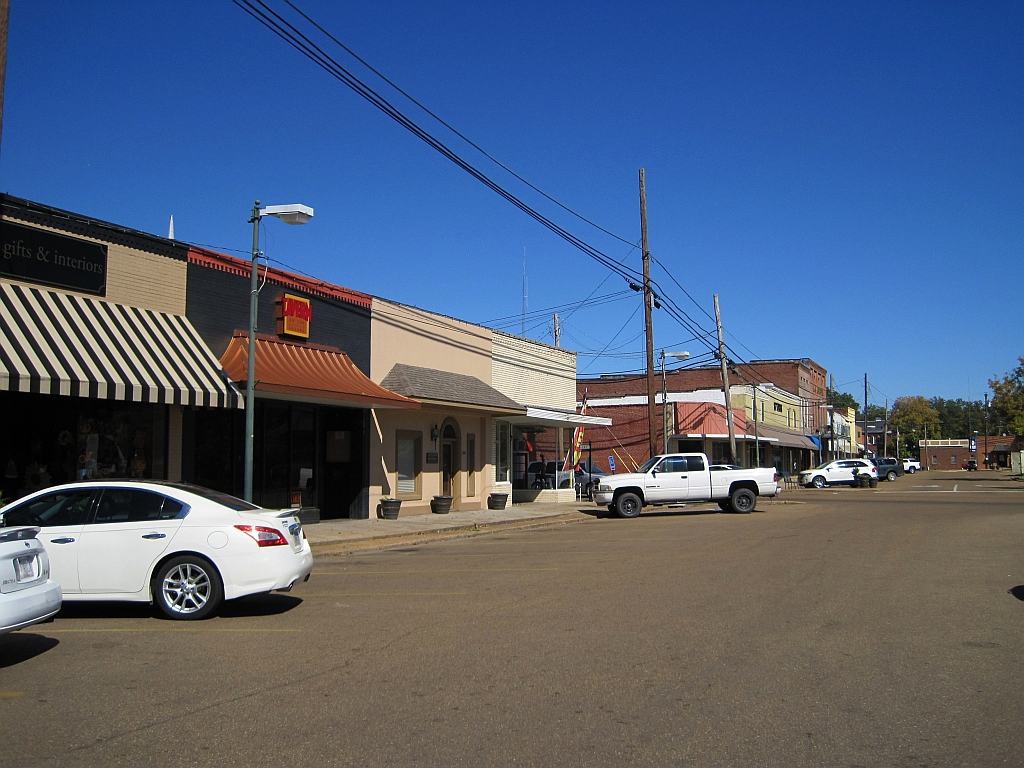 Batesville, Mississippi.